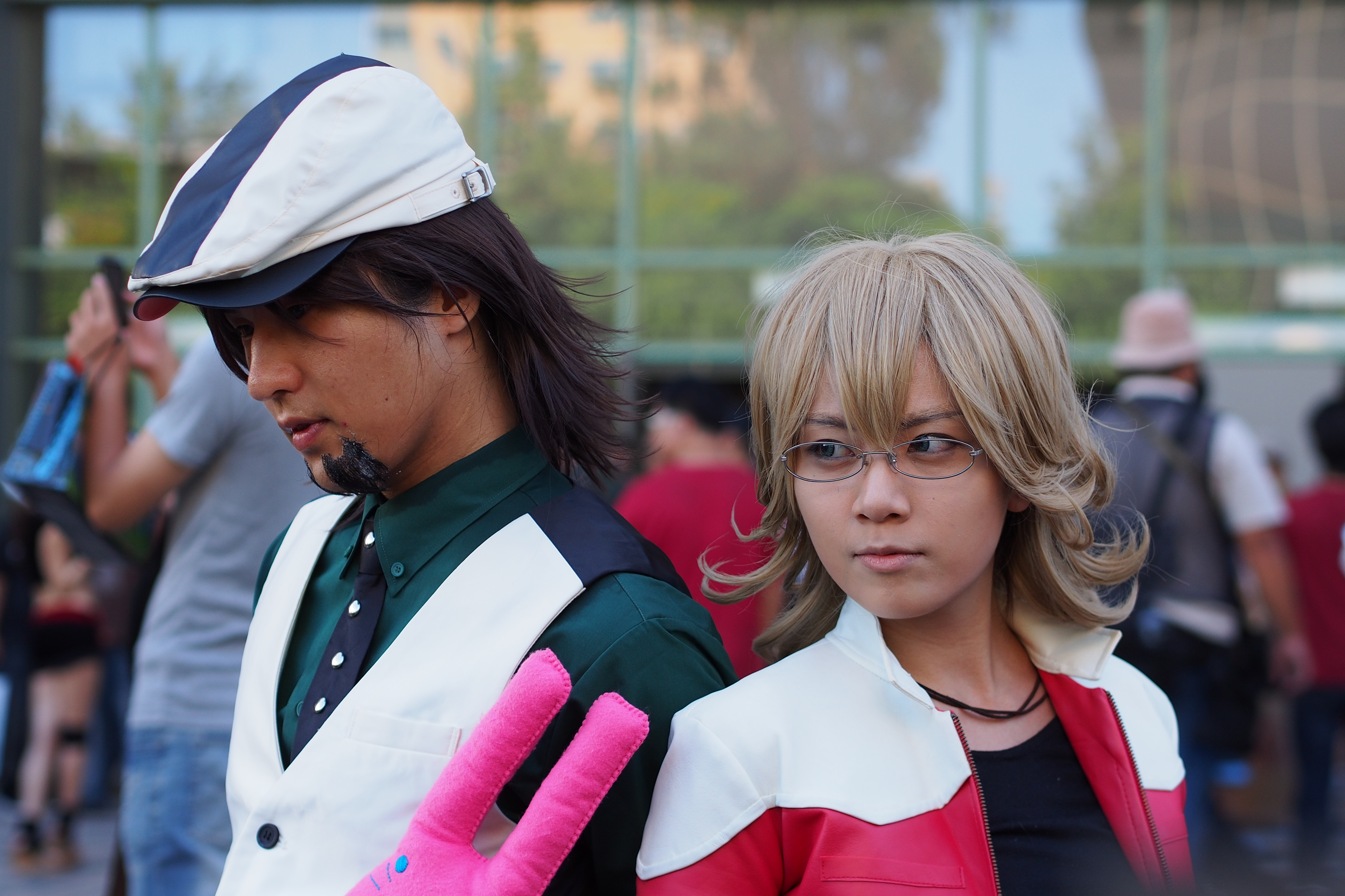 Fancy Frontier 20 ＜Tiger & Bunny＞鏑木・T・虎徹（左）與バーナビー・ブルックスJr.（右）